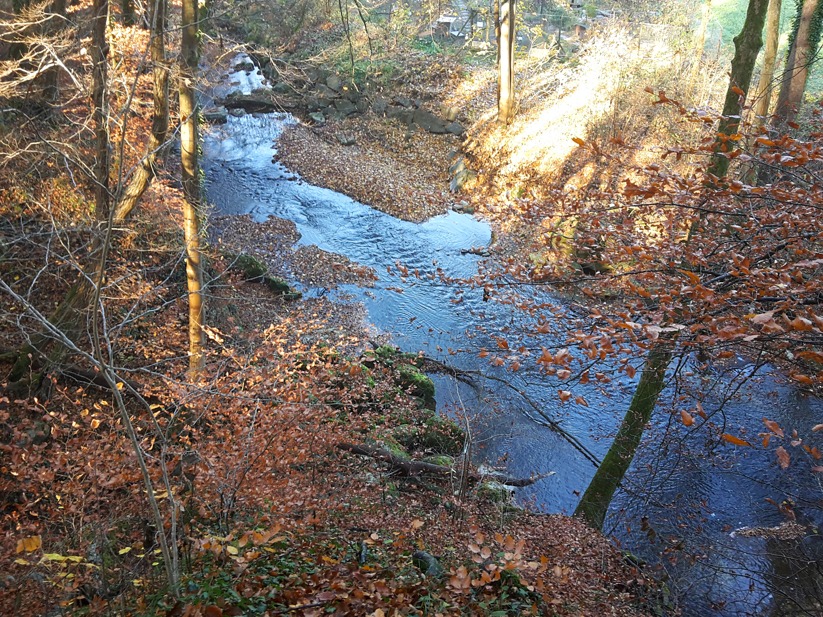 Mündung des Tobelbachs in die Reppisch bei Reppischhof